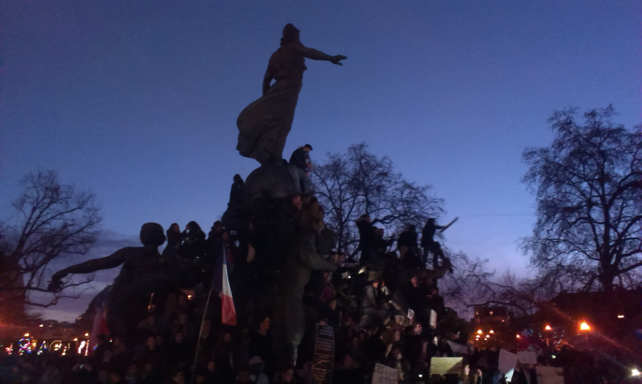 Marché républicaine contre le terrorisme - Paris - 11 janvier 2015